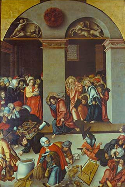 Die Austreibung der Wechsler und Händler aus dem Tempel in Jerusalem